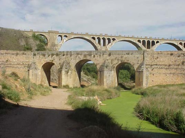 Puente de Carlos IV (Soria)